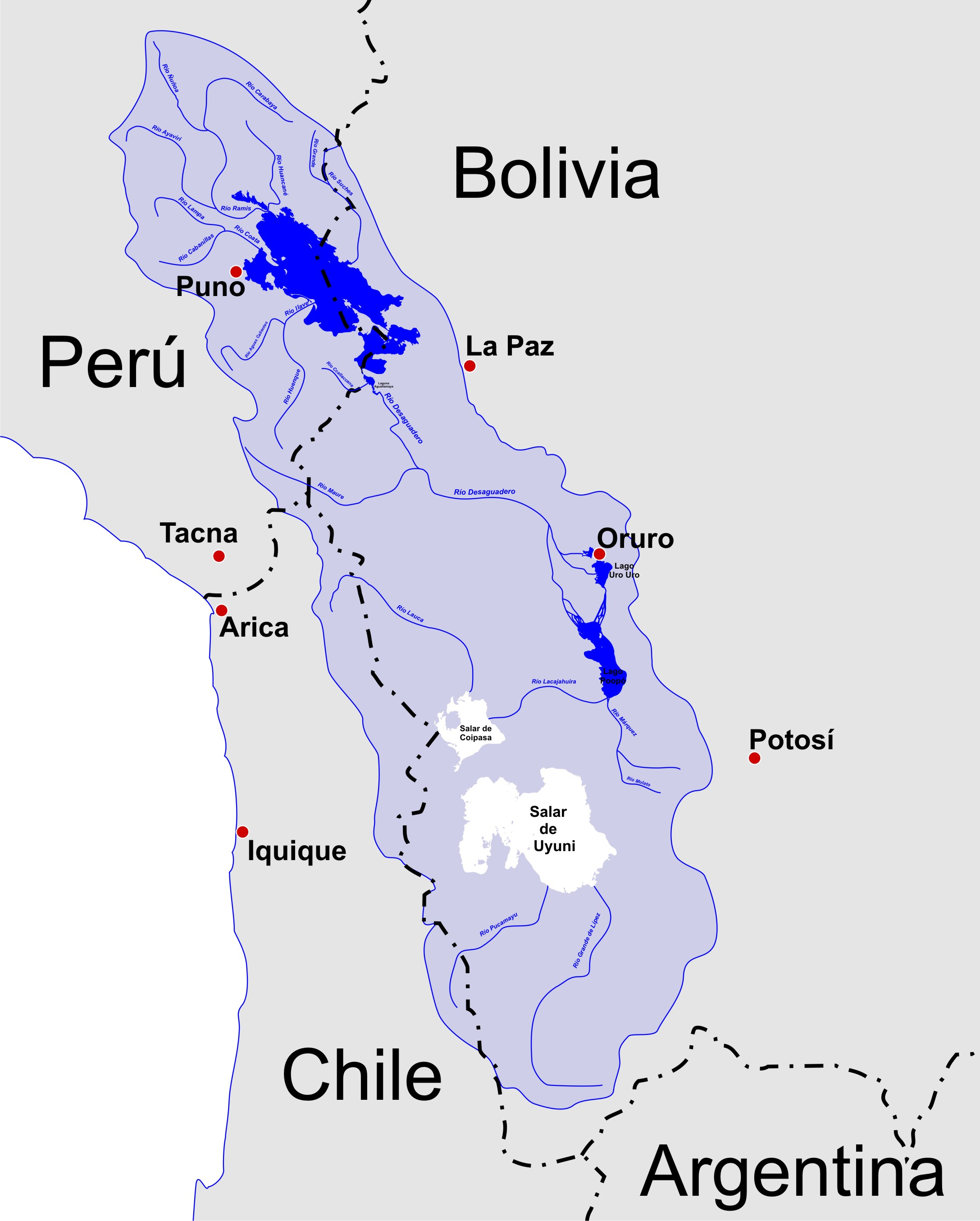 Mapa de las dos principales cuencas endorréicas de la Meseta del Collao. El sistema; Lago Titicaca - Río Desaguadero - Lago Poopó - Salar de Coipasa. Y la cuenca del Salar de Uyuni